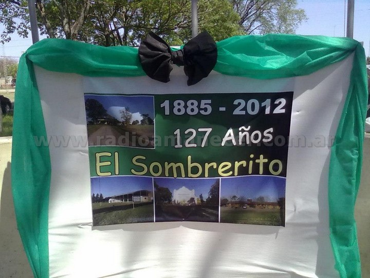 aniversario-el-sombrerito1.jpg